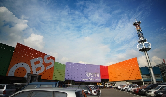 OBS本社外観